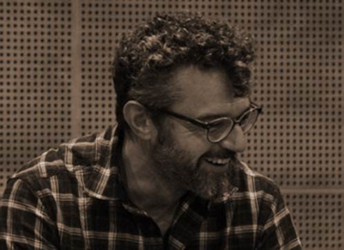 Marco Sommariva